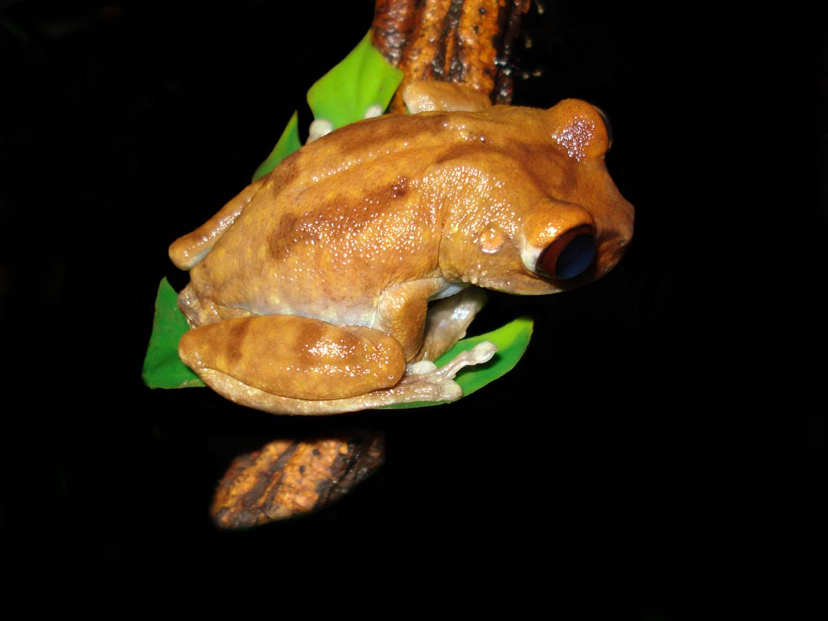 Female Leptopelis uluguruensis